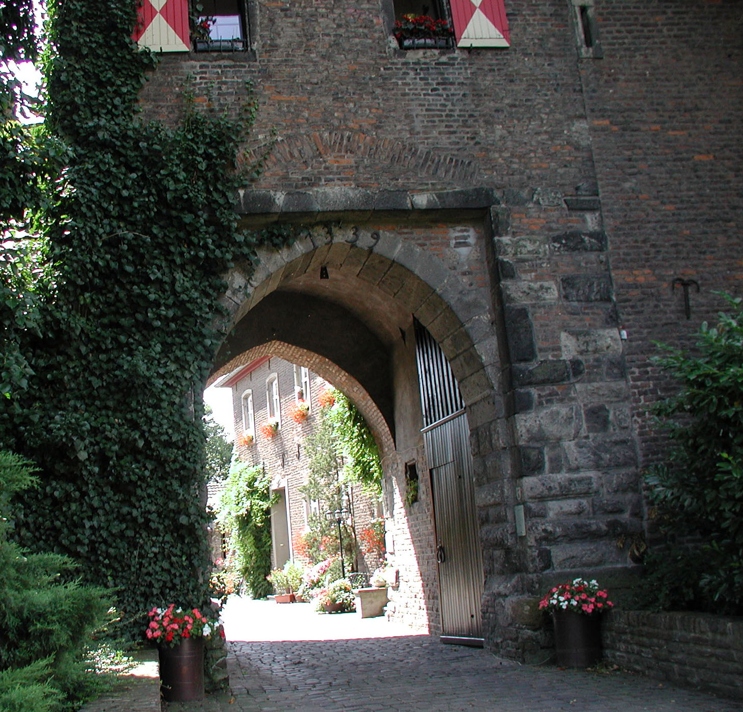 Burg Efferen - Hürth